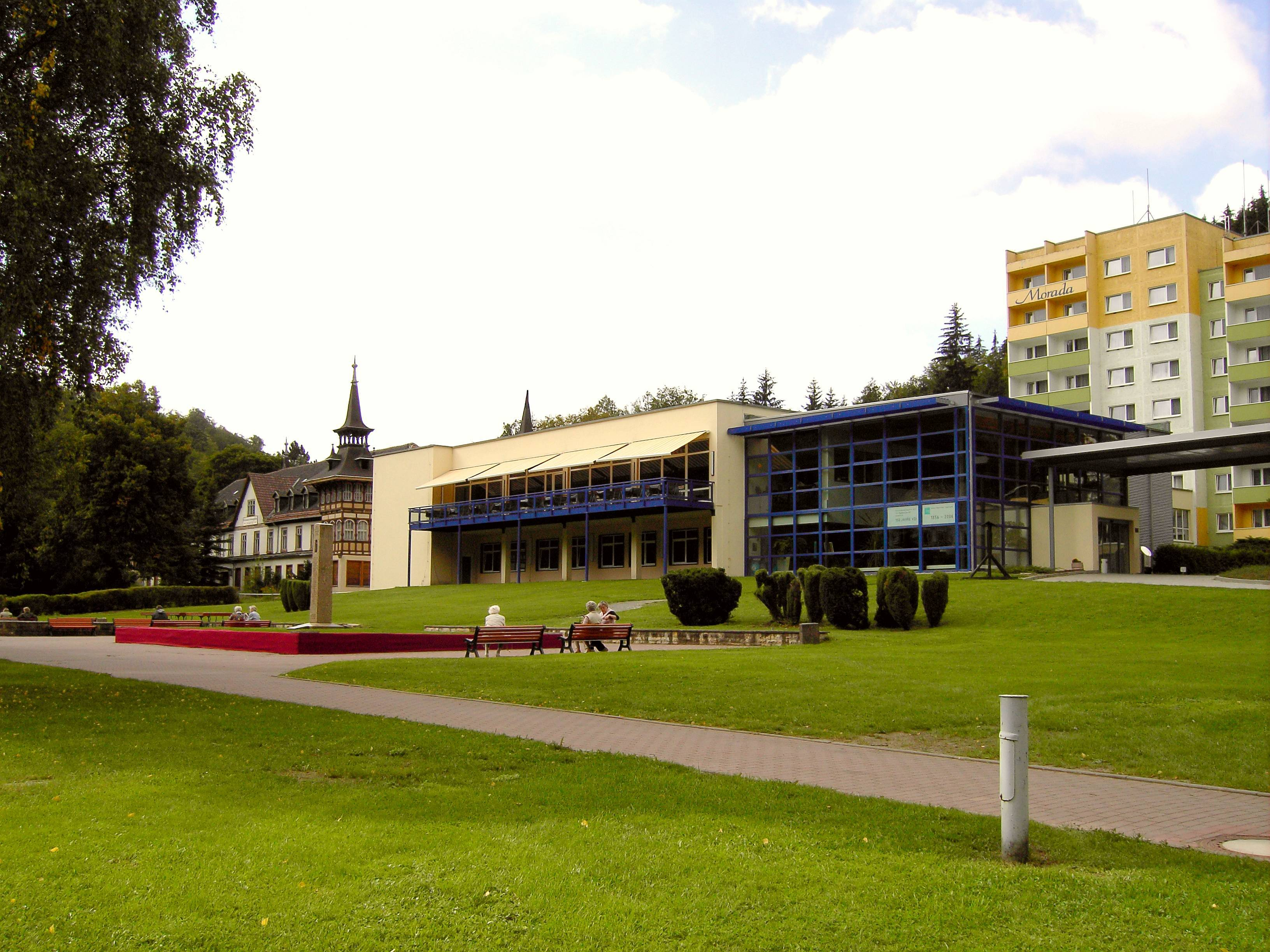 Alexisbad. Die Kuranlagen in Alexisbad